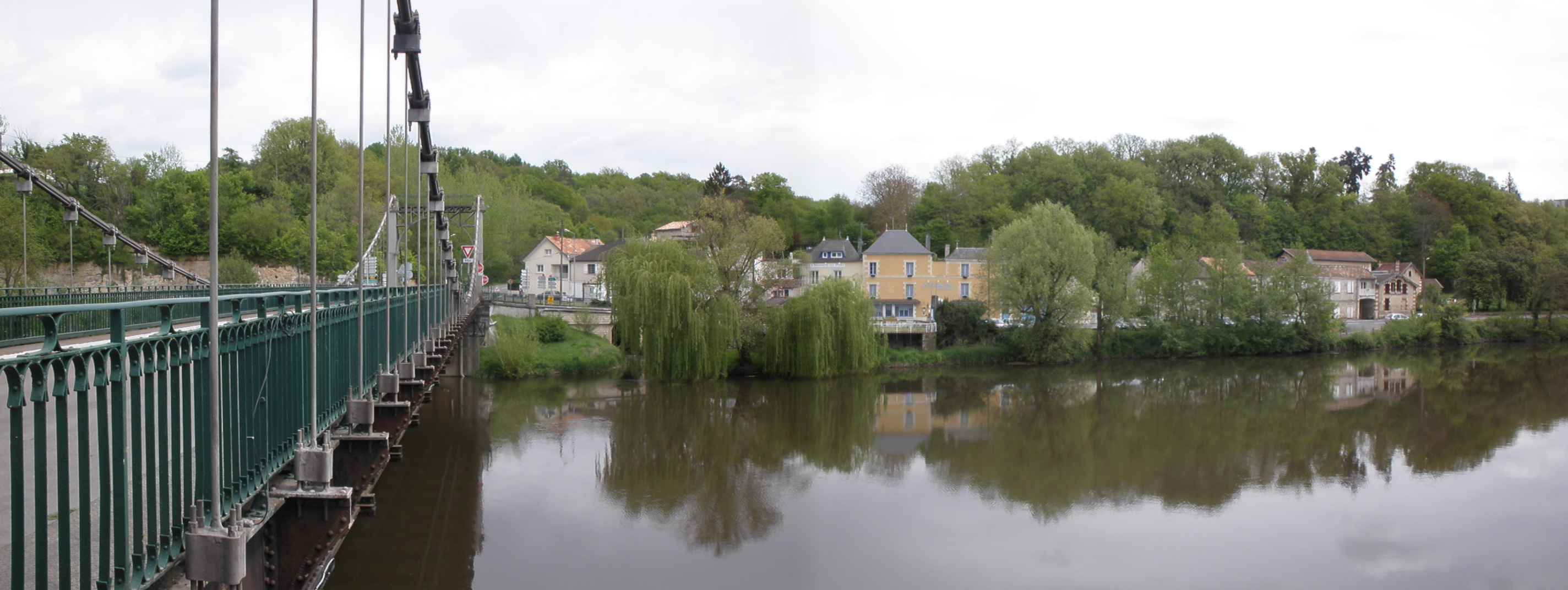 le pont de Bonneuil-Matours sur la Vienne en mai 2013